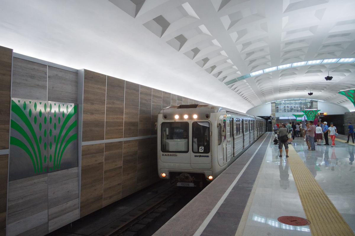 Электропоезд 81-553.3/554.3/555.3 на станции «Дубравная» Казанского метрополитена